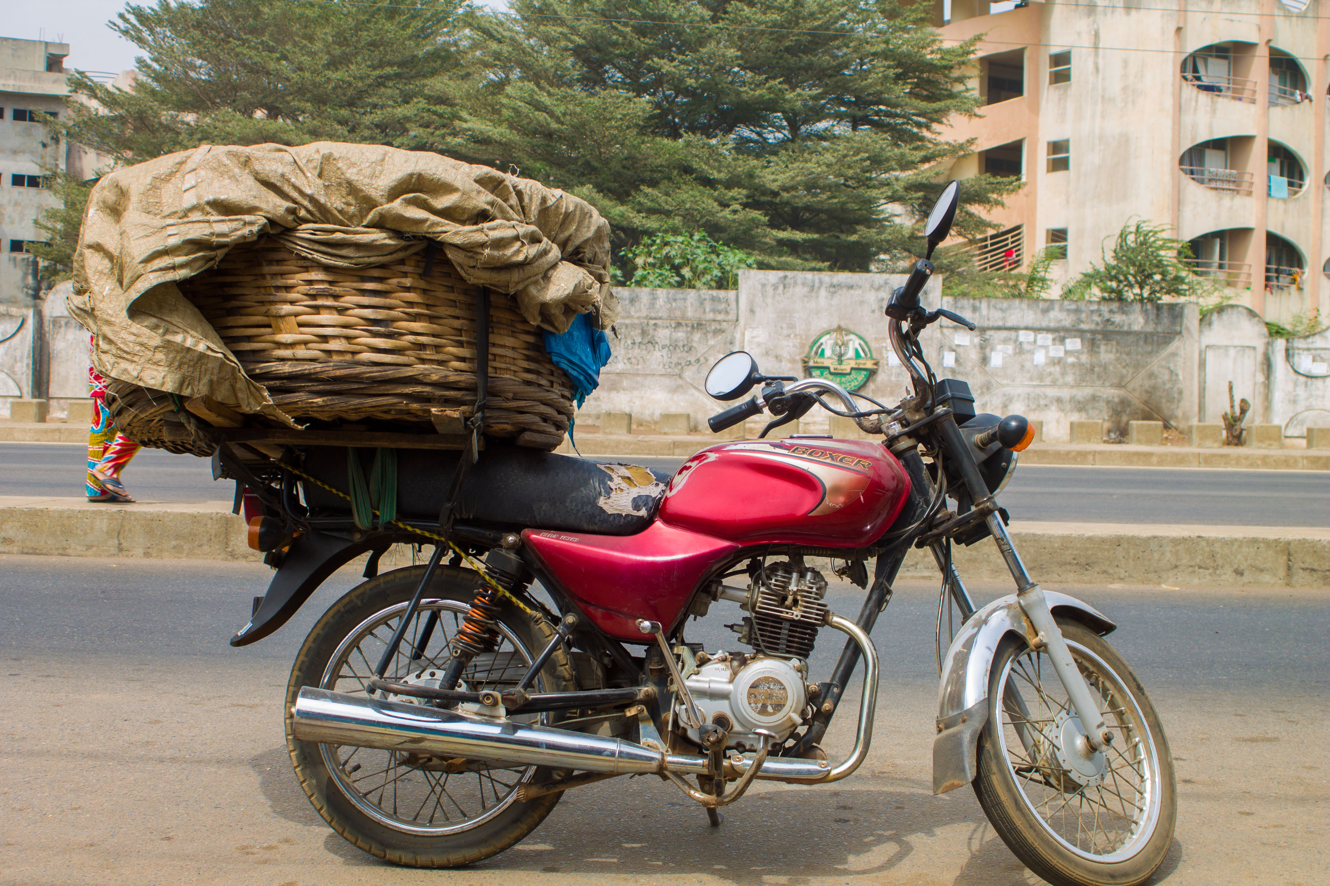 Livraison de pain avec une moto bajaj This is an image with the theme "Africa on the Move or Transport" from: Benin